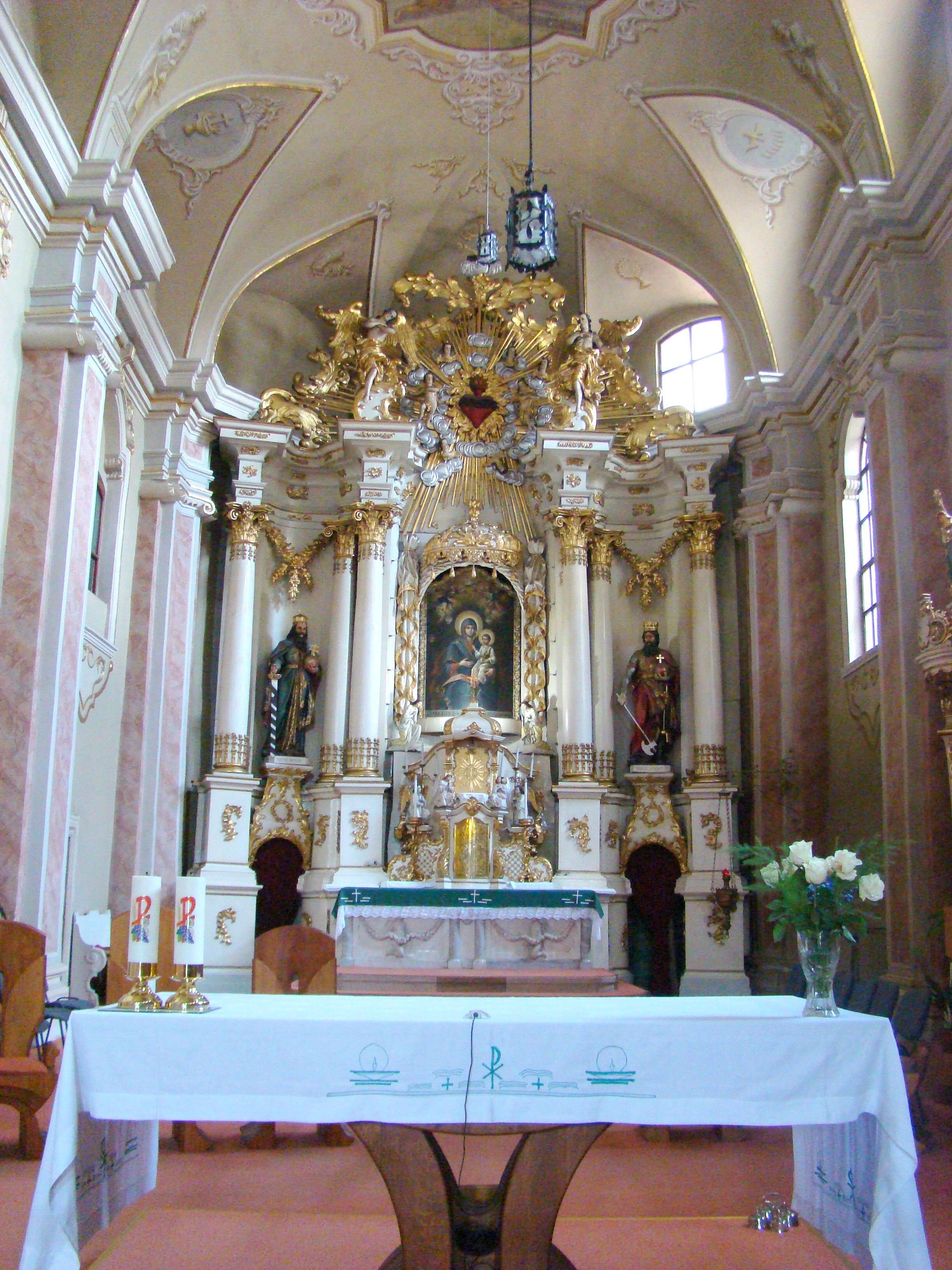 Biserica Franciscană din Cluj 01